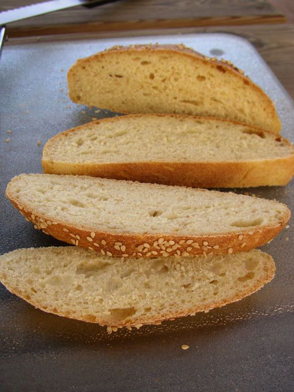 Rezept